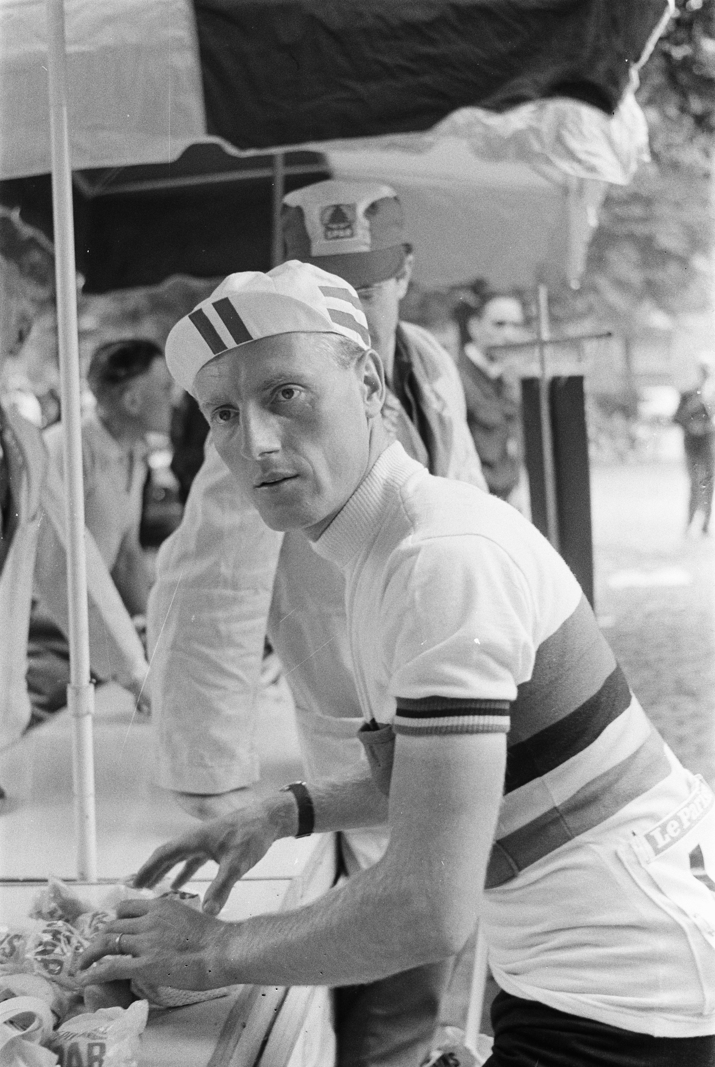 Tour de France , Andre Darrigade voor de start.